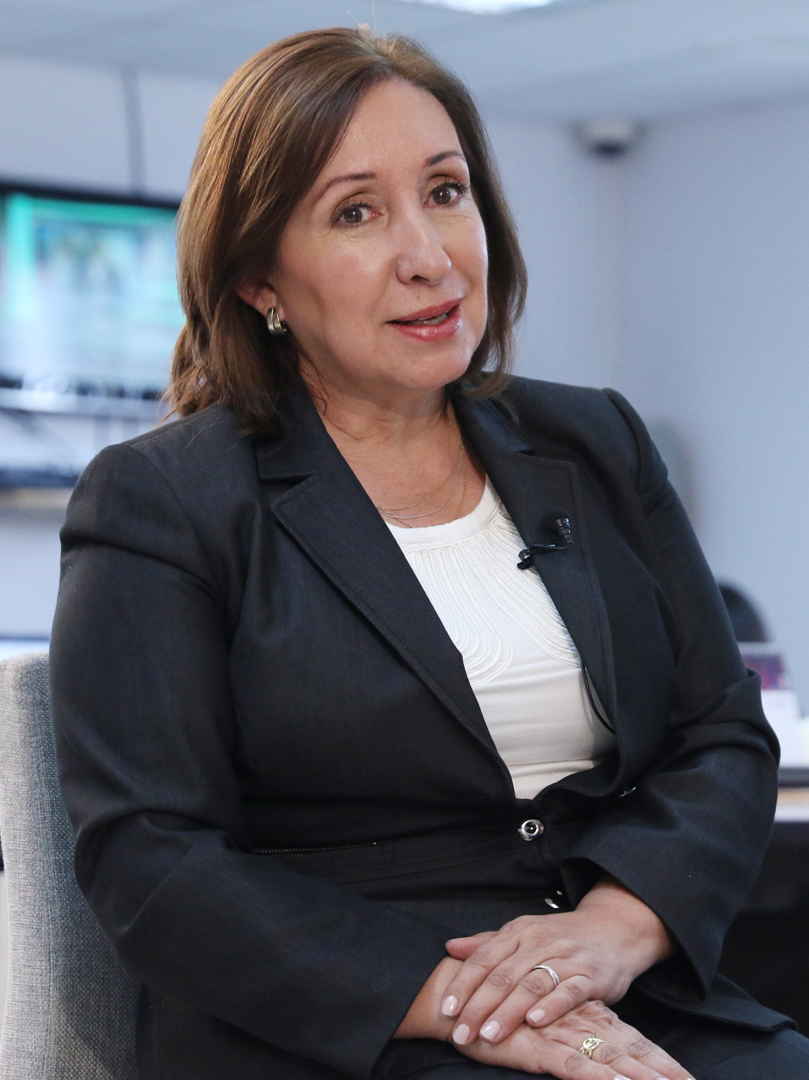 Quito, 05 abril de 2017 (Andes).- Doris Soliz, Secretaria Ejecutiva del Movimiento Alianza PAIS en dialogo con Marco Antonio Bravo Director del programa Ecuador No Para. ANDES/Micaela Ayala V. DORIS SOLIZ ECUADOR NO PARA Quito, 05 abril de 2017 (Andes).- Doris Soliz, Secretaria Ejecutiva del Movimiento Alianza PAIS en dialogo con Marco Antonio Bravo Director del programa Ecuador No Para. ANDES/Micaela Ayala V.